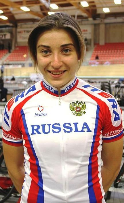 Daria Shmeleva, russische Radsportlerin The making of this document was supported by the Community-Budget of Wikimedia Germany.